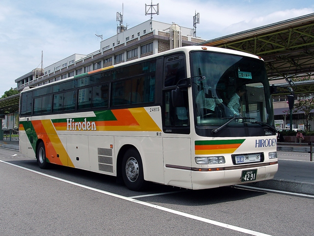 事業者: 広島電鉄 陸運登録: 広島22く42-91 シャーシ: 日野自動車 KC-RU3FSCB 車体: 日野車体工業 年式: 1998年 撮影場所: 米子駅前